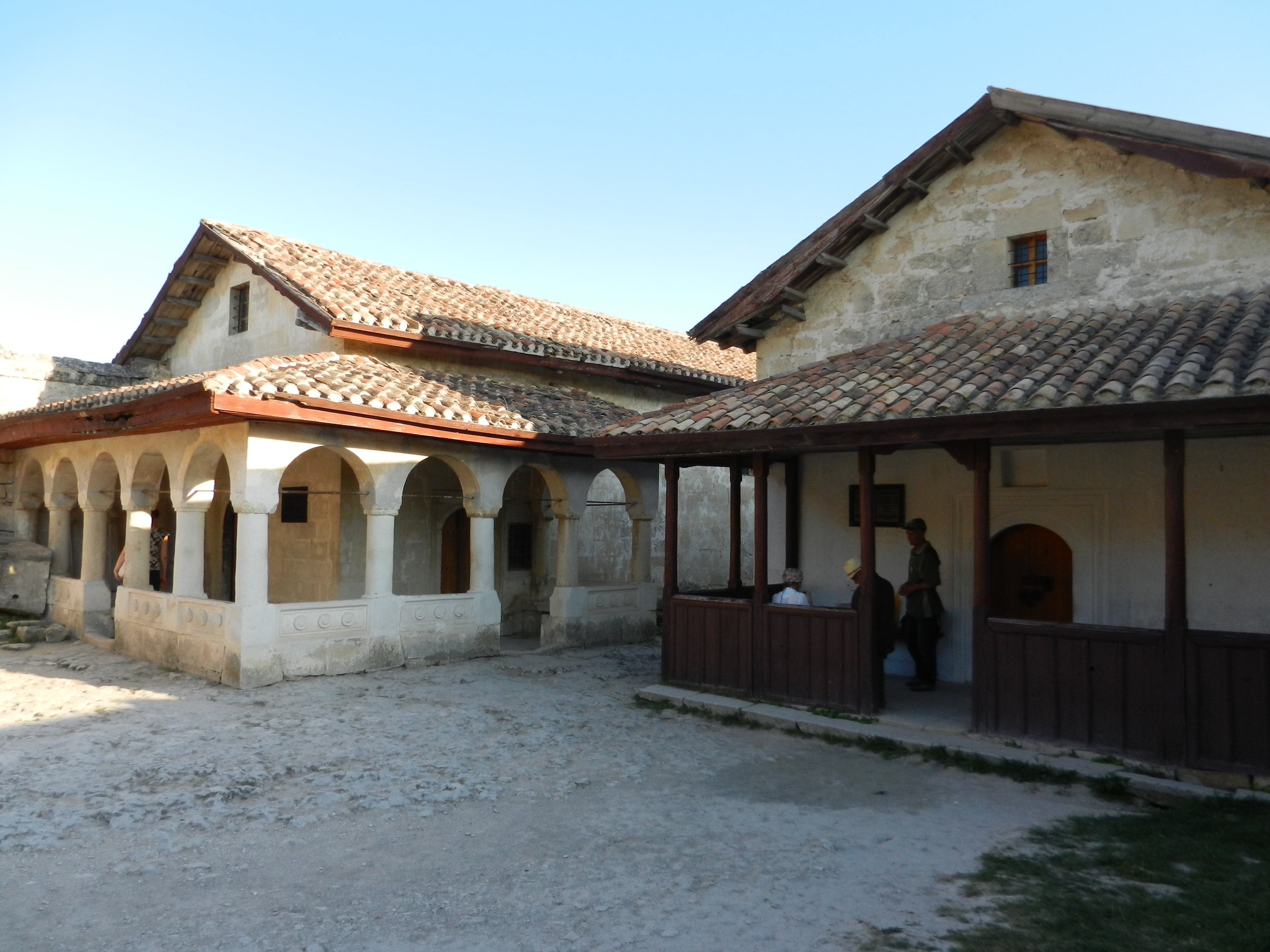 Караїмська кенаса (мала), Бахчисарай, південно-східна околиця міста (колишнє Старосілля), на мисовому плато столової гори (близько 540 м над рівнем моря)